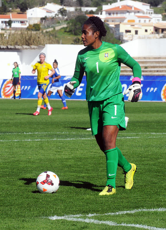 a_89_6023